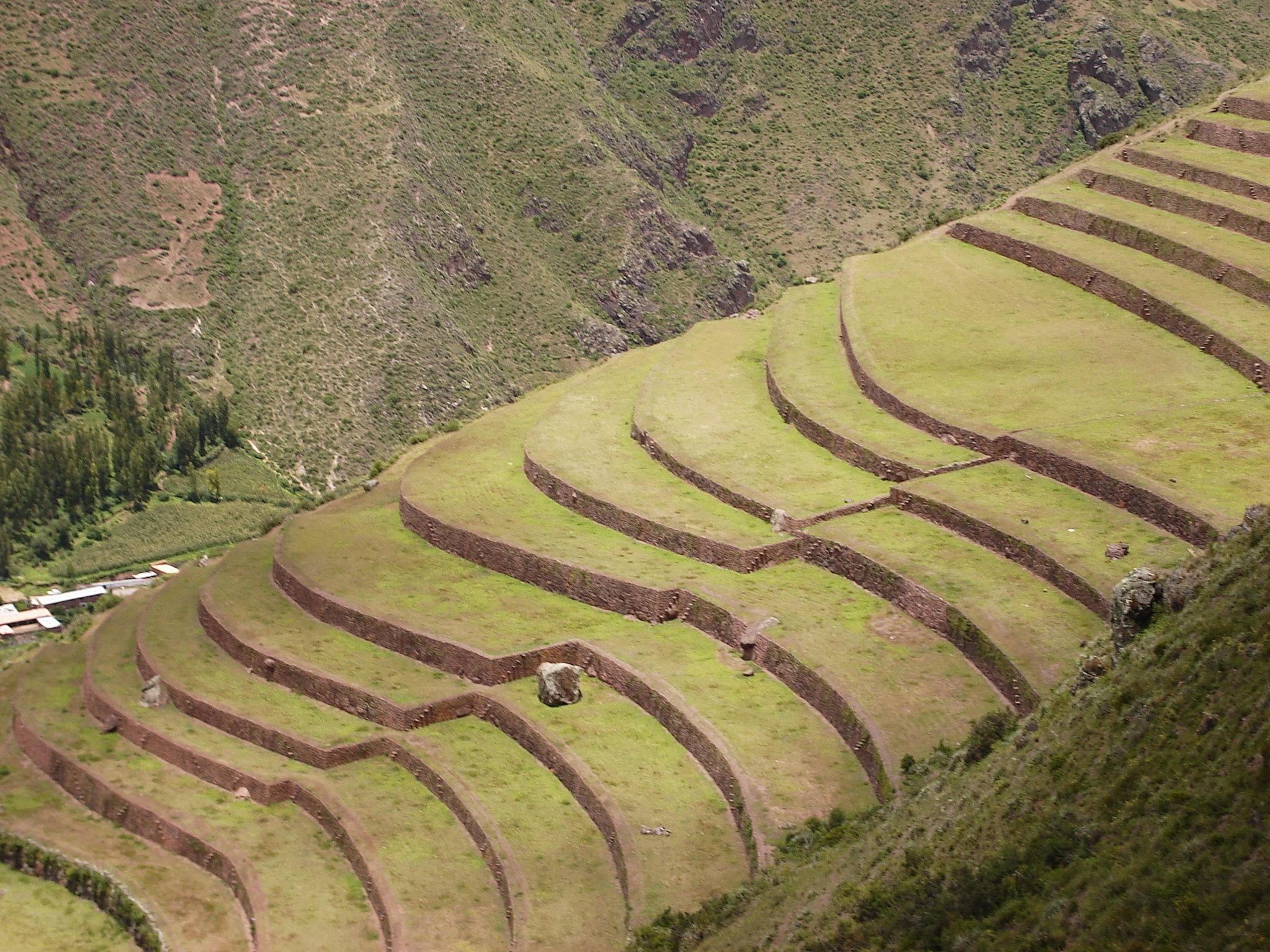 Foto tirada por mim, em Pisac.